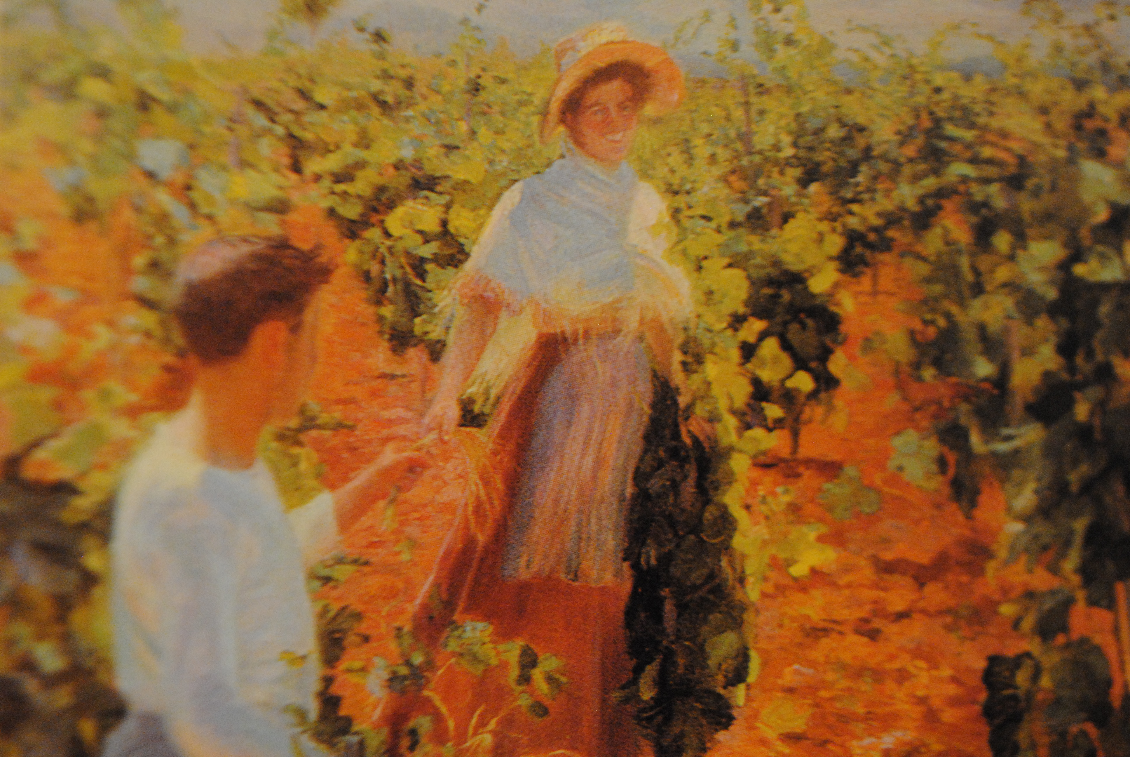 Els vermadors (ca. 1904) de Pilar Montaner